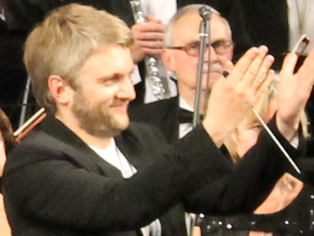 Кирило Карабиць, Львів 30 червня 2015